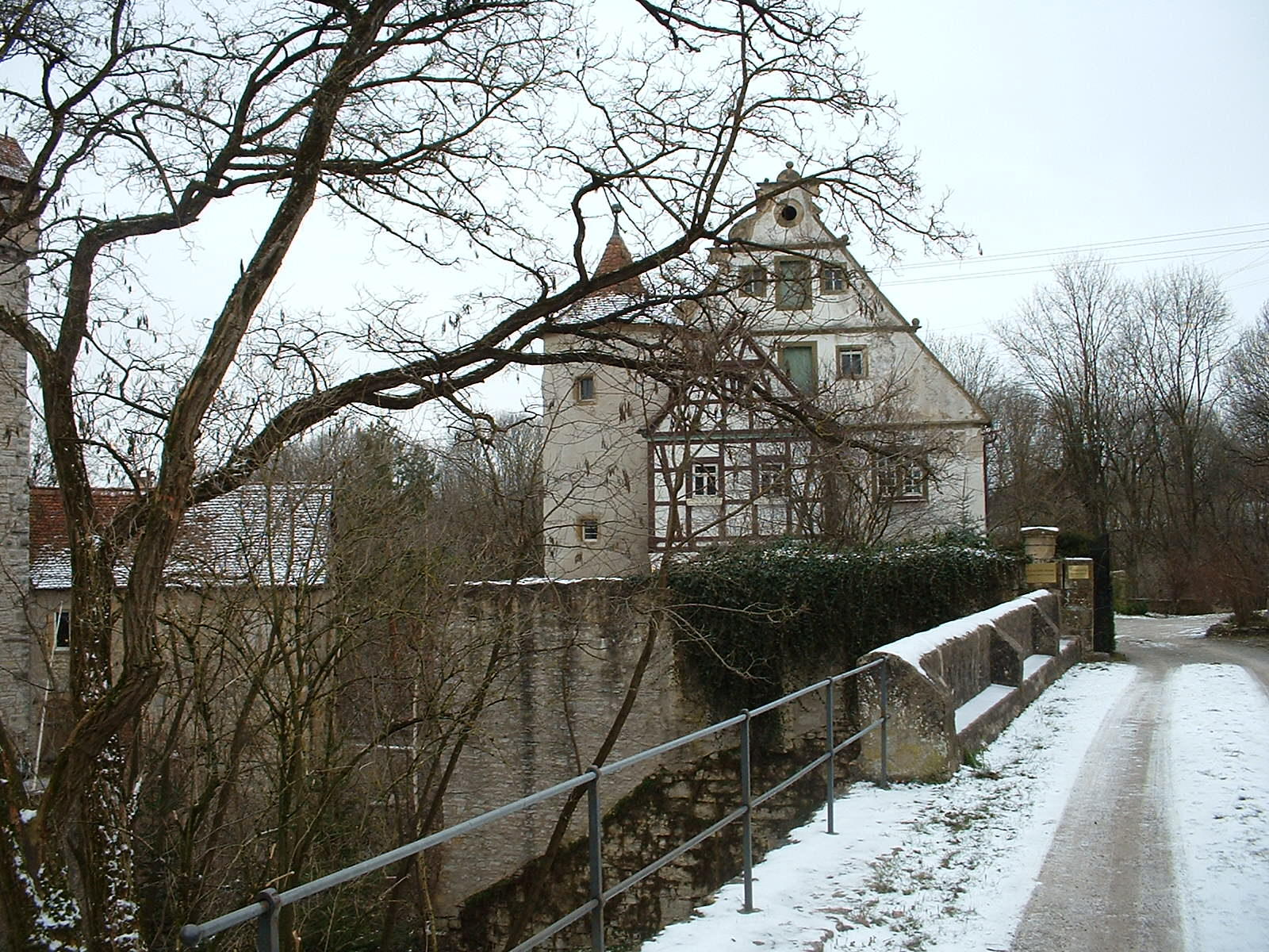 Burg Amlishagen